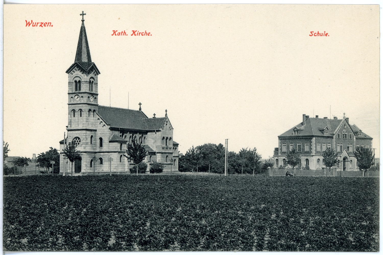 Wurzen; Katholische Kirche, Schule This postcard is from publisher Brück & Sohn in Meißen ( postcard has a unique number 19247 and is available in a higher resolution at the publisher. This images was uploaded in a cooperation project between Wikipedians and the publisher.